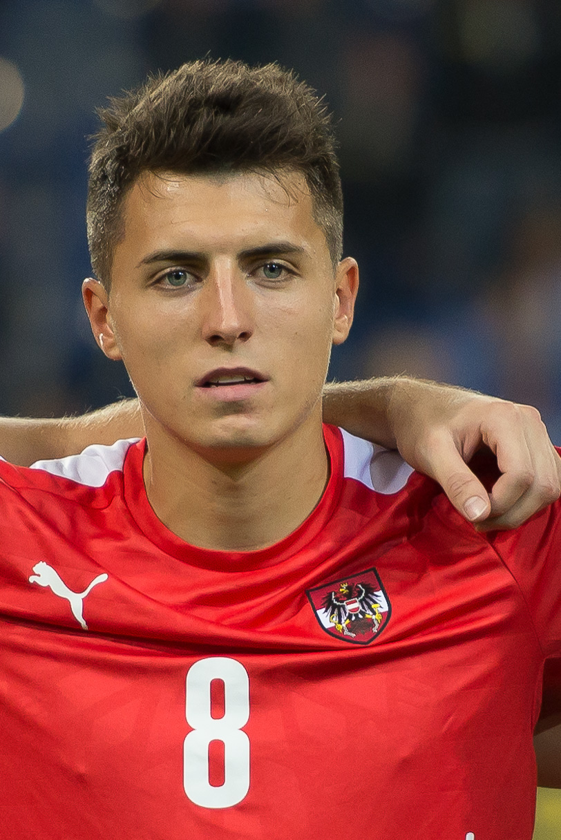 Fußball U21 EM-Qualifikation Österreich gegen Bosnien und Herzegowina St. Pölten, 5. September 2014 Alessandro Schöpf